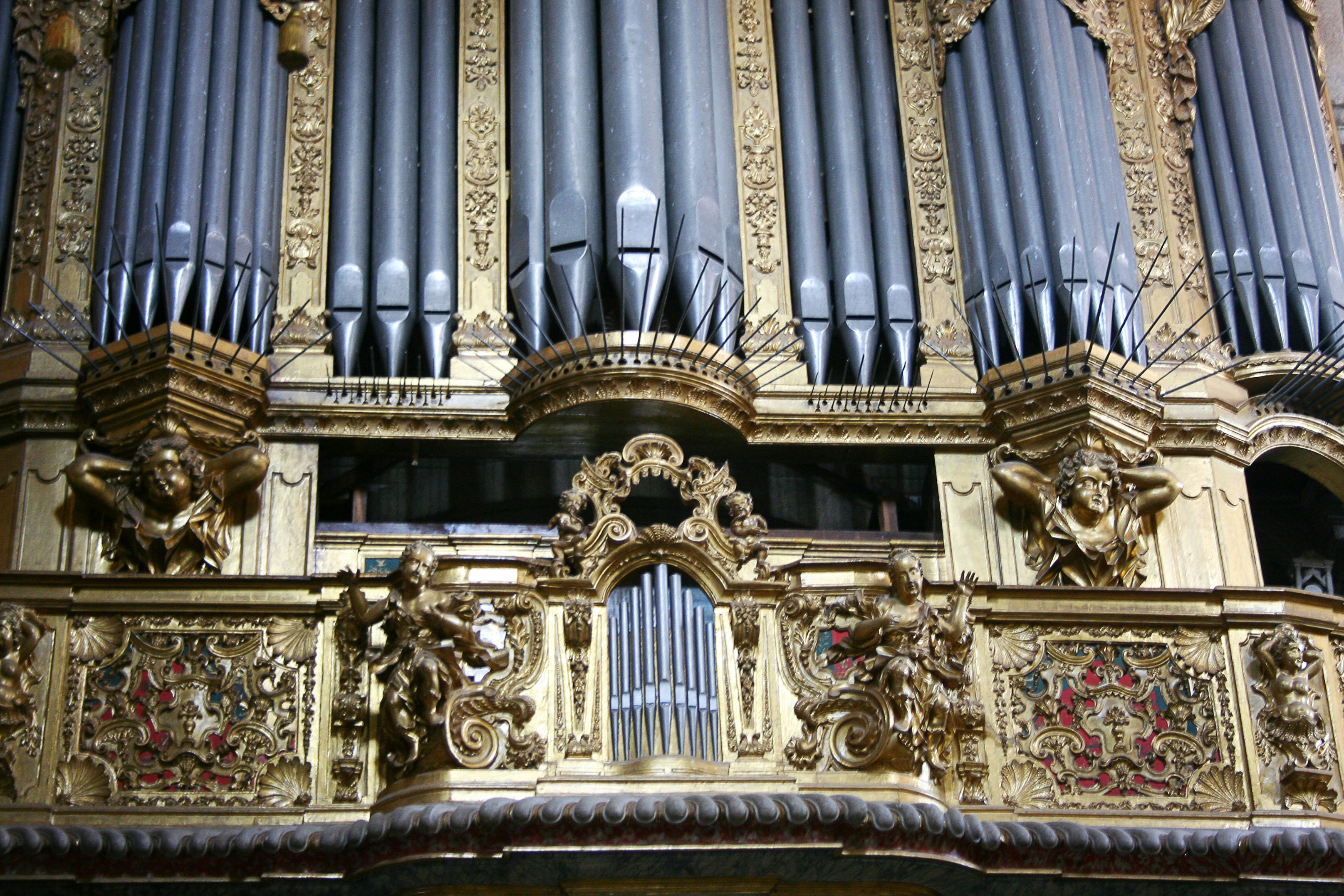 Detalhe do Orgão do Mosteiro de Arouca.